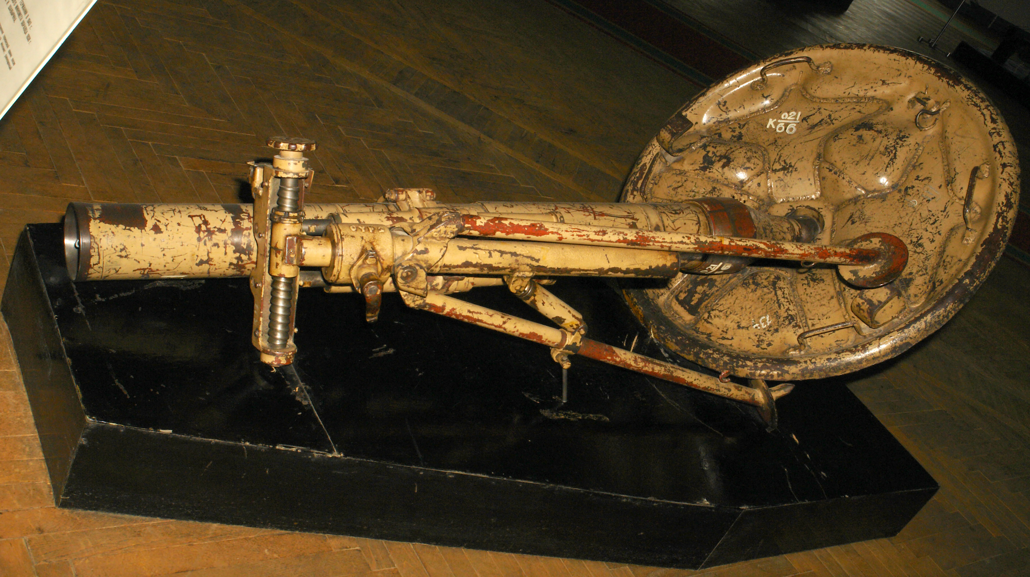 120-мм МИНОМЕТ, ИЗГОТОВЛЕННЫЙ В ГЕРМАНИИ В 1943 г. ПО ОБРАЗЦУ СОВЕТСКОГО 120-мм ПОЛКОВОГО МИНОМЕТА ОБРАЗЦА 1938 г. КОНСТРУКТОРА Б. И. ШАВЫРИНА. Трофей Красной Армии. Минометы этого образца были введены на вооружение германской армии после безуспешных попыток немецких конструкторов создать свой миномет, равноценный по боевым качествам советскому. Военно-исторический музей артиллерии, инженерных войск и войск связи, Санкт-Петербруг.